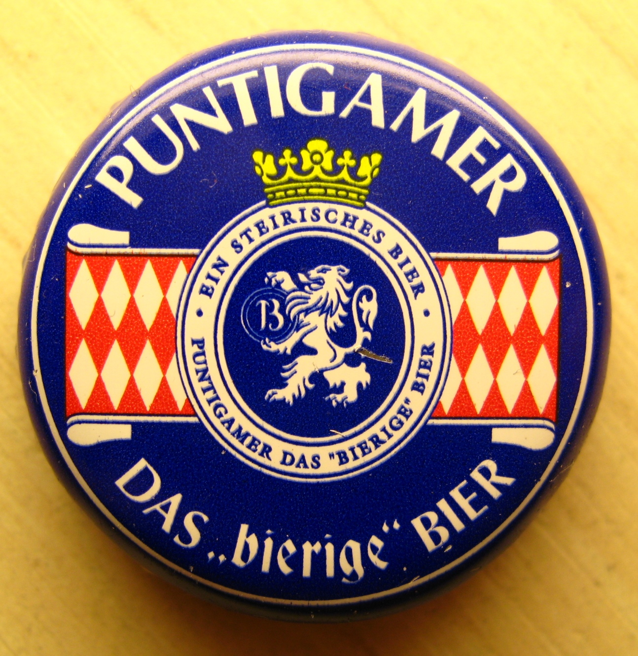 Bierkapsel eines Puntigamer Bieres